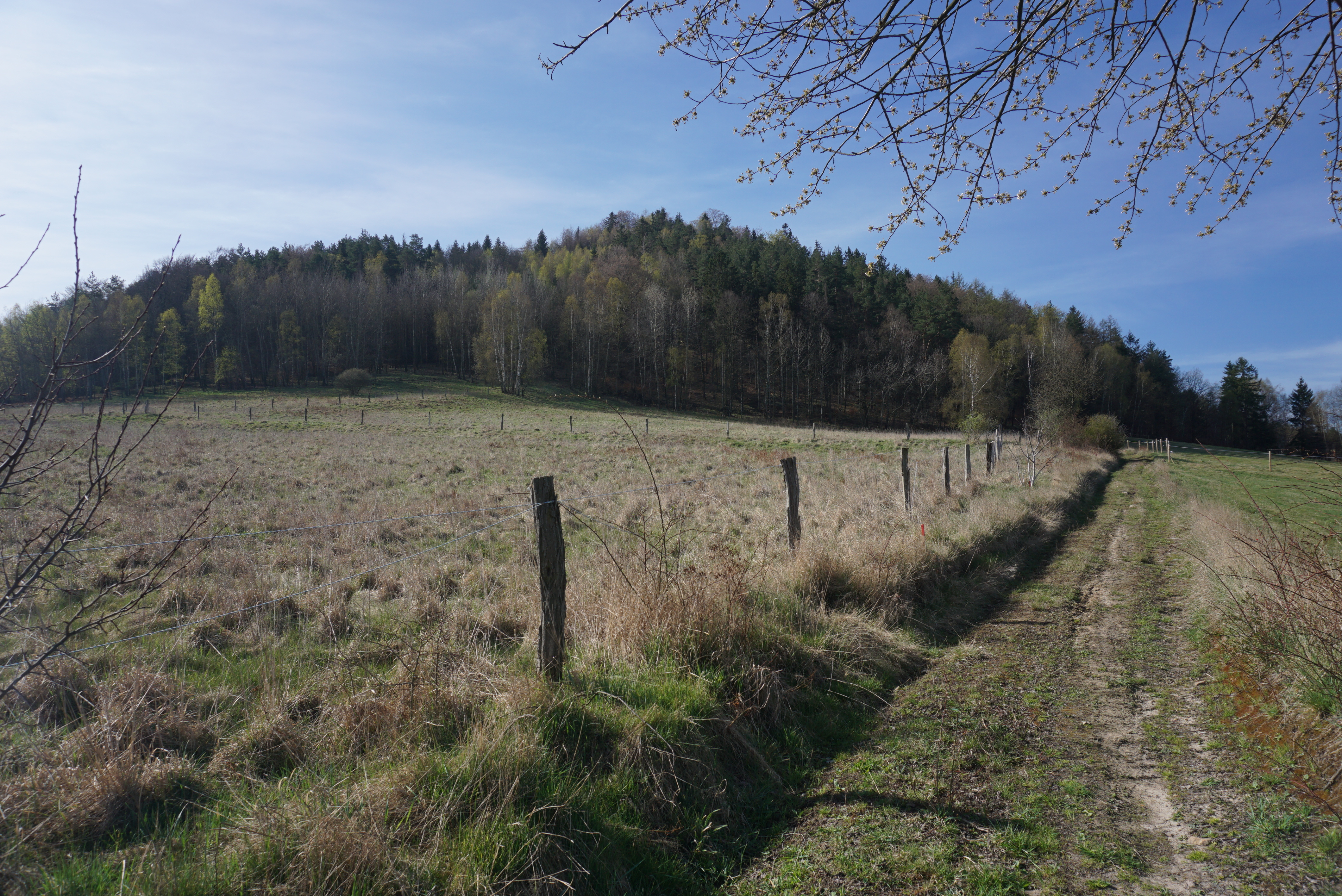 Kostelní vrch (Kirchberg, 500 m) u Jítravy - pohled od severu